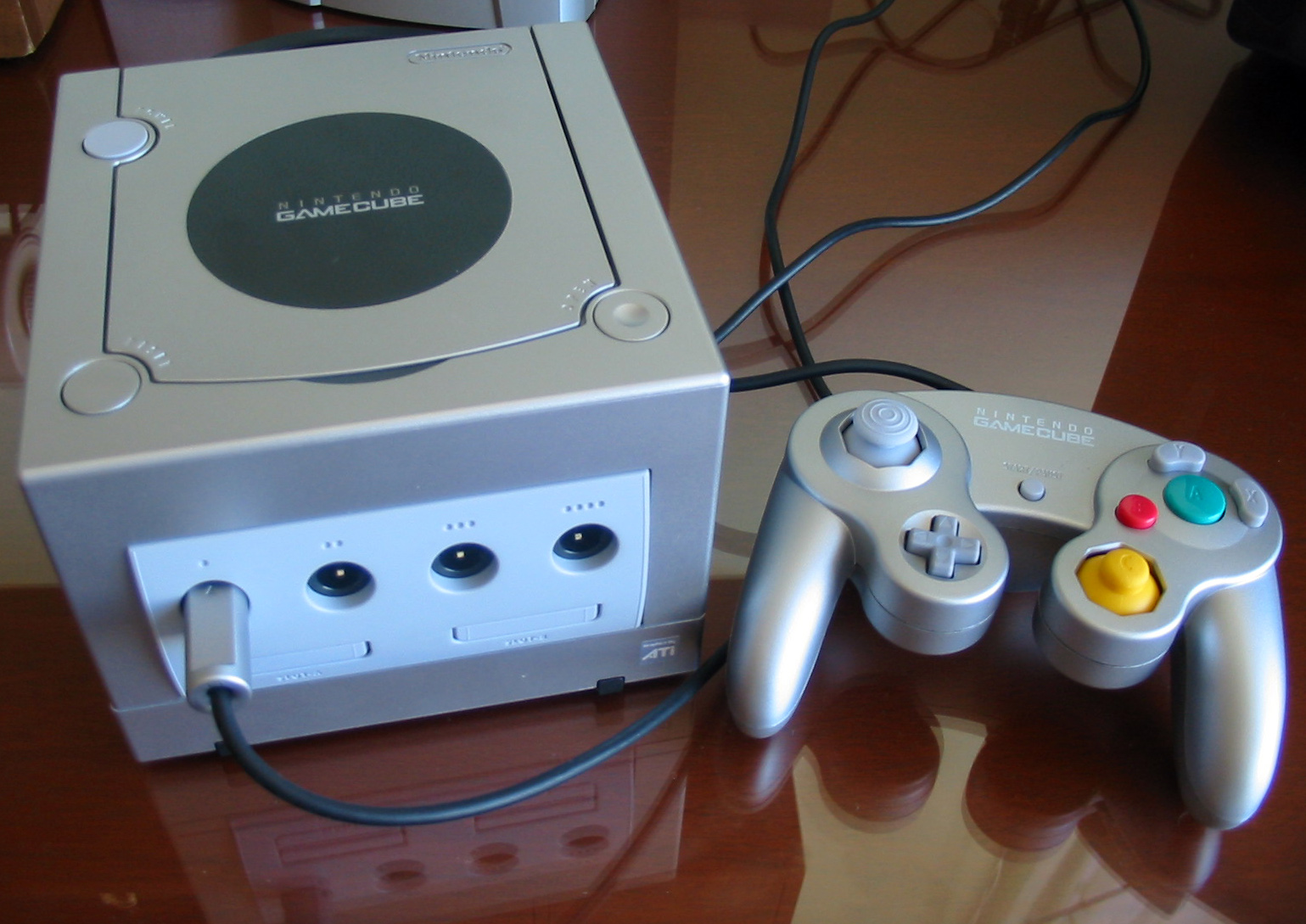 Nintendo GameCube Silver.